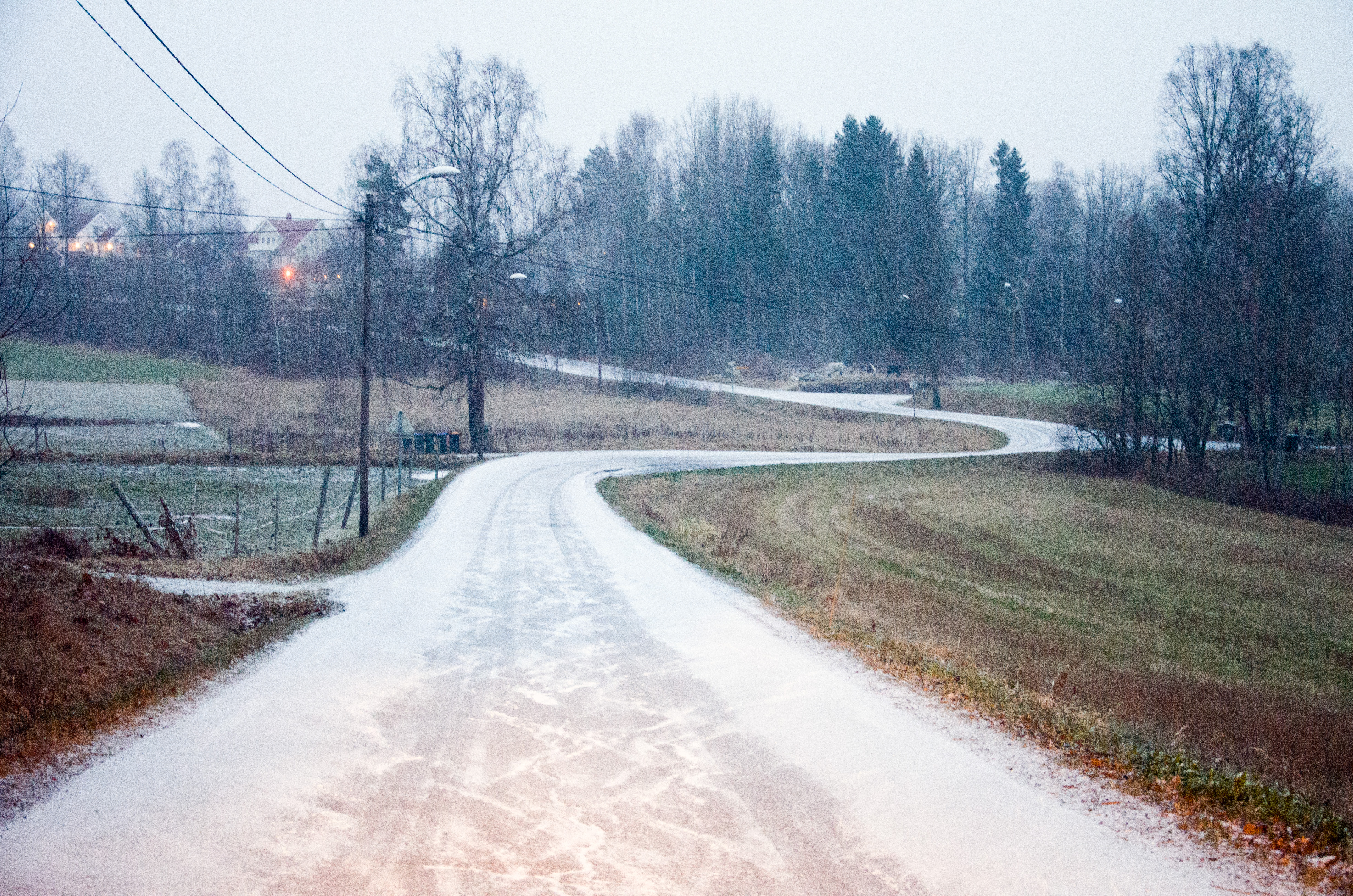 Fylkesvei 780 Fonsveien, i Re, Vestfold